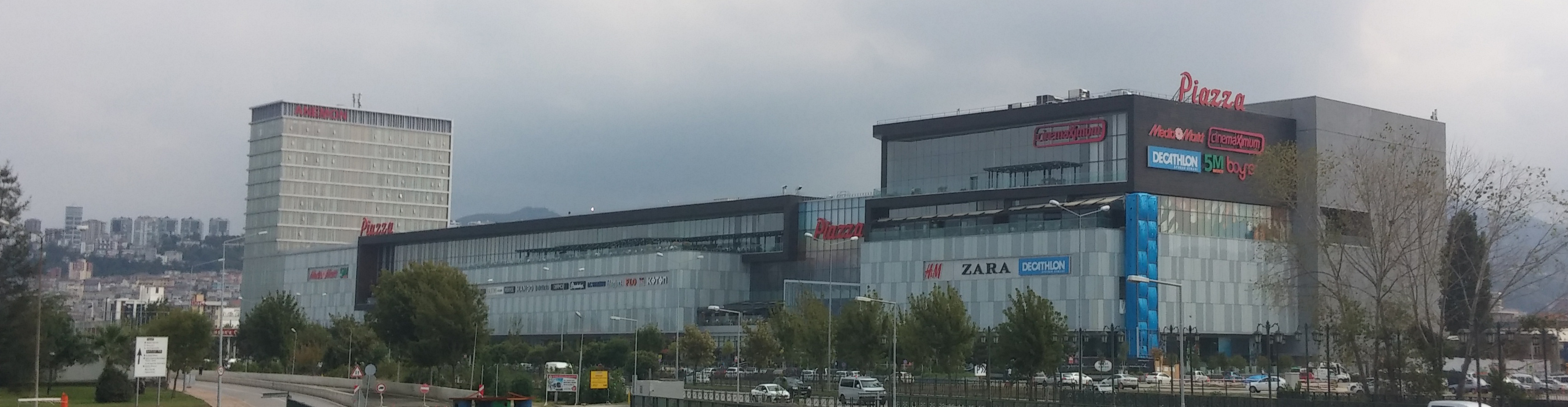 Samsun'un Canik ilçesinde bulunan Piazza AVM'nin uzaktan görünümü.